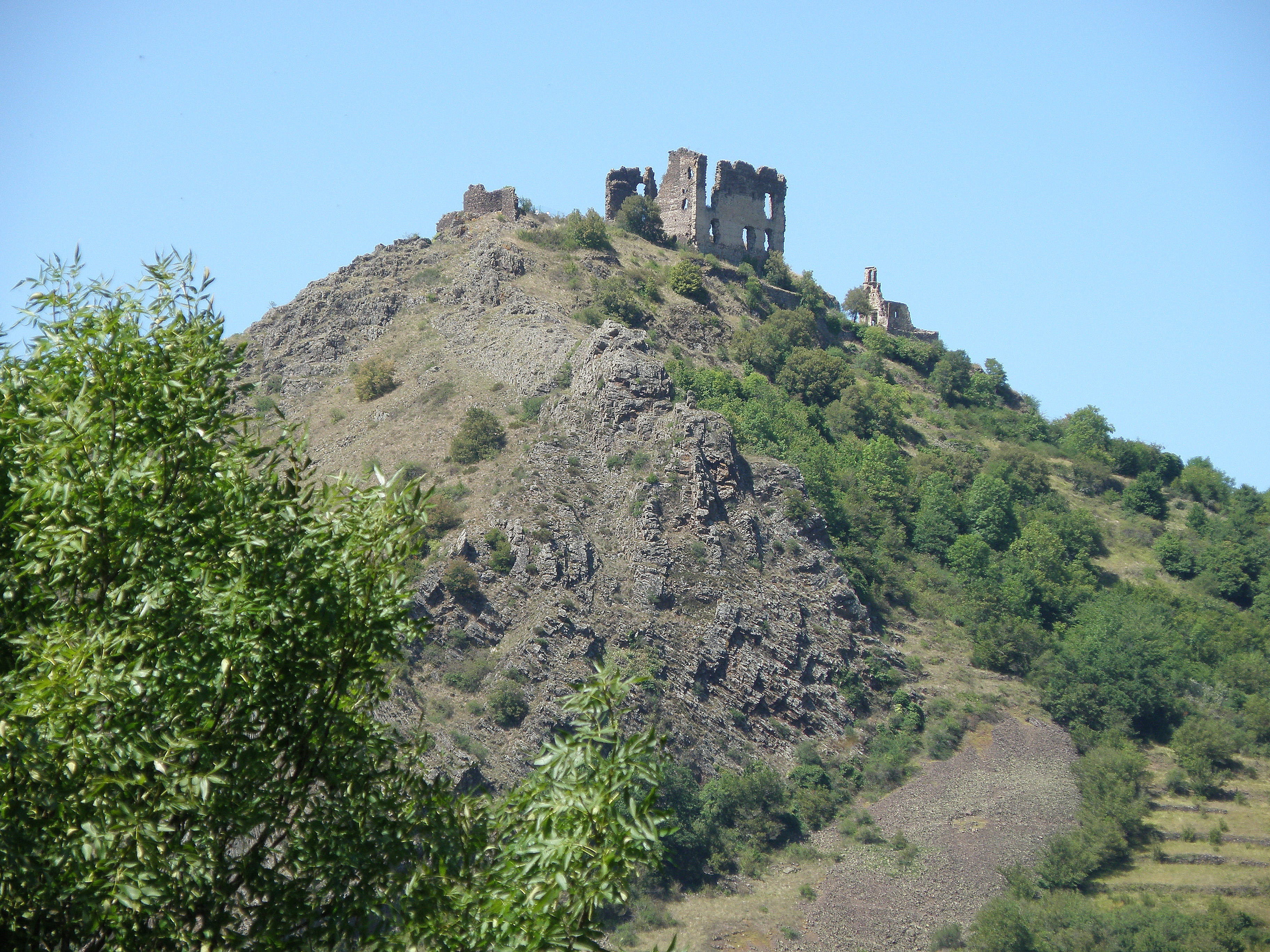 Retournac, dép. de la Haute-Loire, France (Auvergne). Château ruiné d’Artias, perché sur un suc de 706 m. d’altitude, situé le long de la Loire à quelques km. en amont (et donc à l’ouest) de Retournac. Vue montrant le flanc méridional du suc, prise depuis le hameau de Ventressac (comm. de Chamalières-sur-Loire) sur la rive opposée de la Loire. La ruine de la chapelle castrale se dresse un peu en contrebas à droite de la vaste muralle au centre.